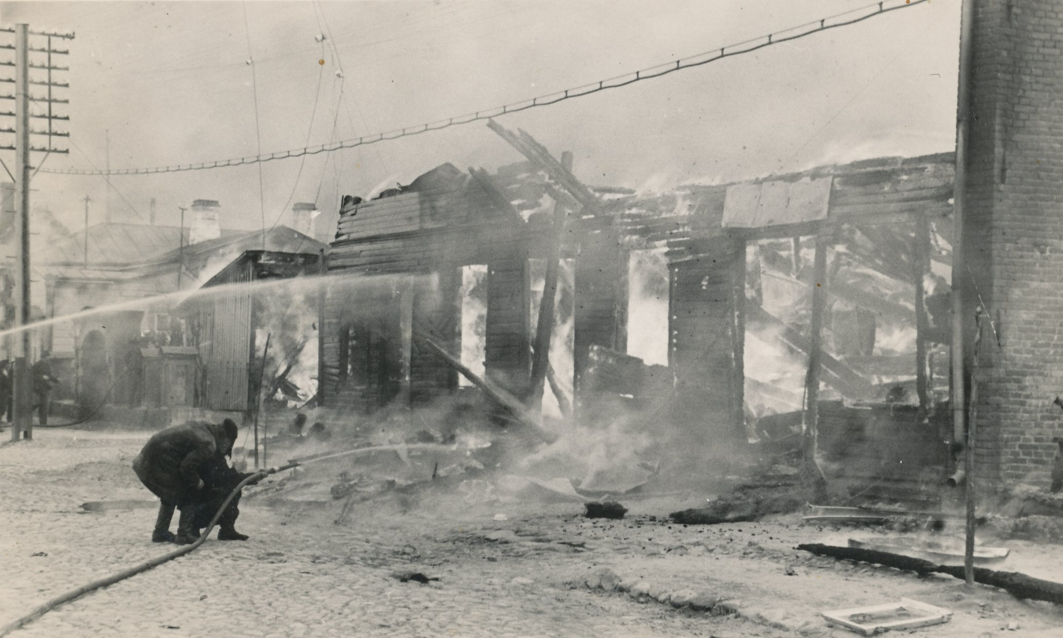 Tulekahju Petseris 24. mail 1939.a